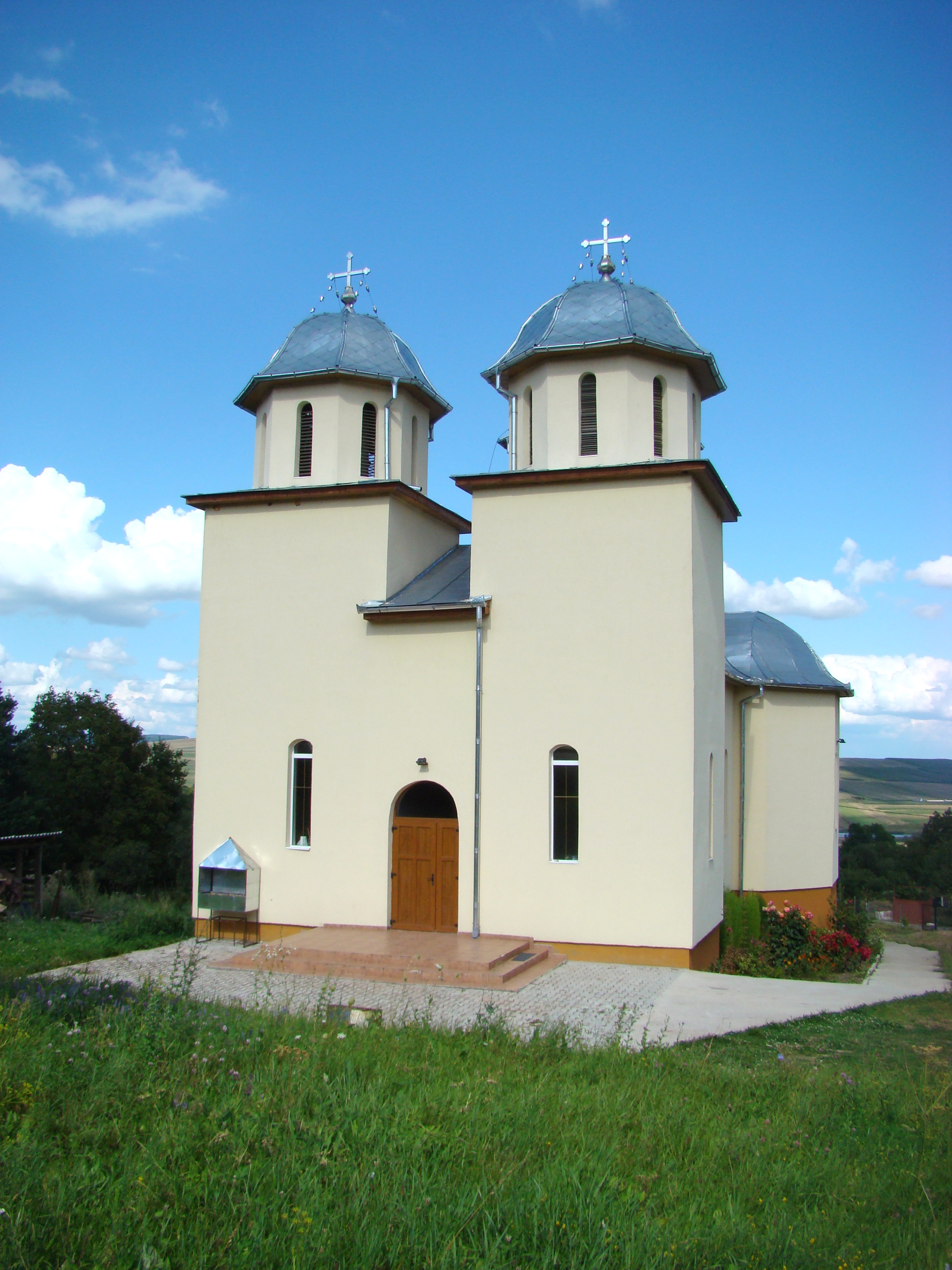 Biserica ortodoxă din satul Comșești, comuna Tureni, județul Cluj